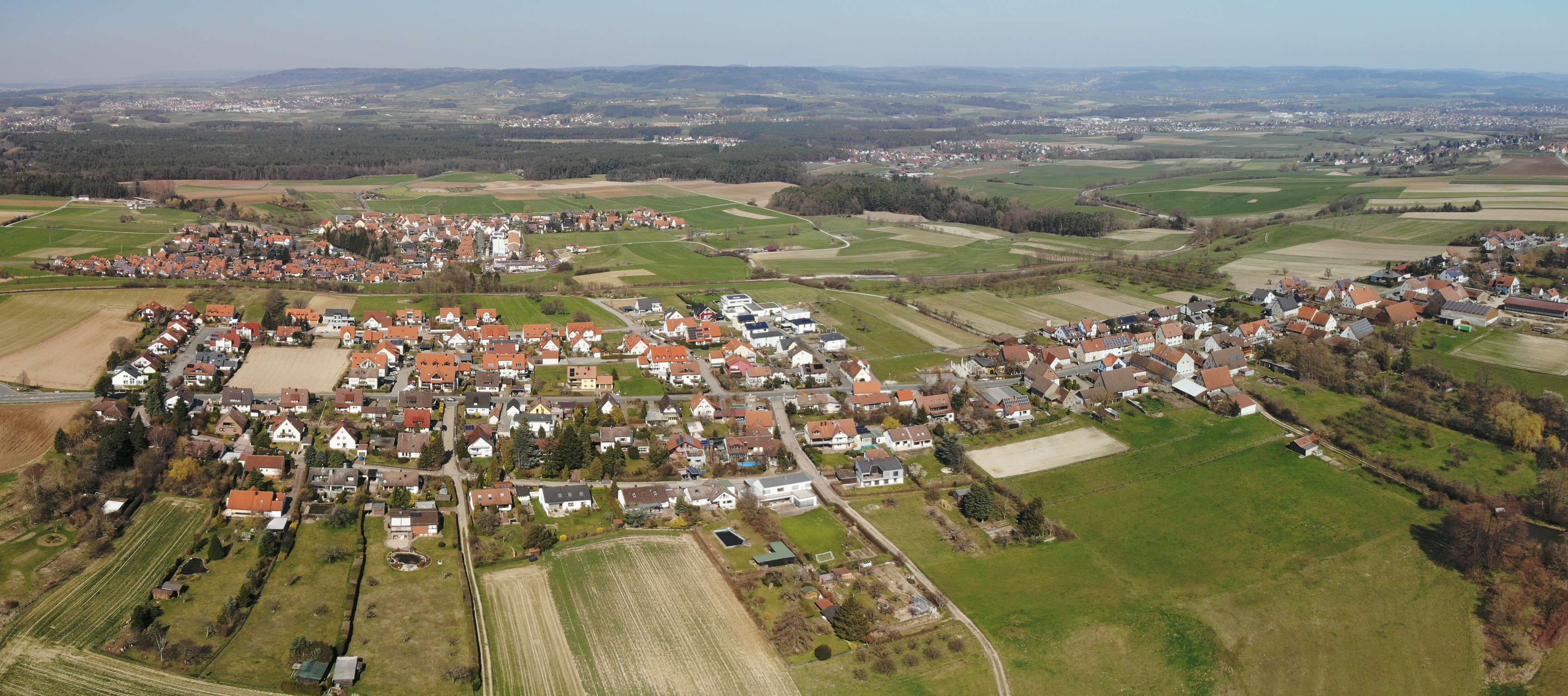 Käswasser Panorama Luftaufnahme (2020)